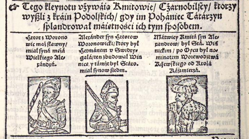 Грегор Воронович, его сын Александр Воронович и Матвей Кмита в книге Bartoszа Paprockiego "Gniazdo cnoty: zkąd herby rycerstwa sławnego Krolestwa Polskiego, Wielkiego Księstwa Litewskiego, Ruskiego, Pruskiego, Mazowieckiego, Zmudzkiego y inszych Państw do tego Krolestwa nalezacych Książąt y Panow poczatek swoy maią". Kraków: 1578, s. 1182